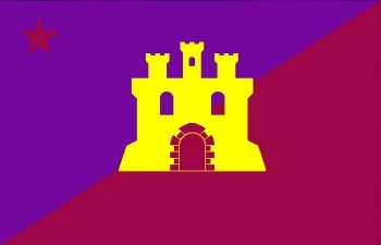 Bandera de izquierda comunera